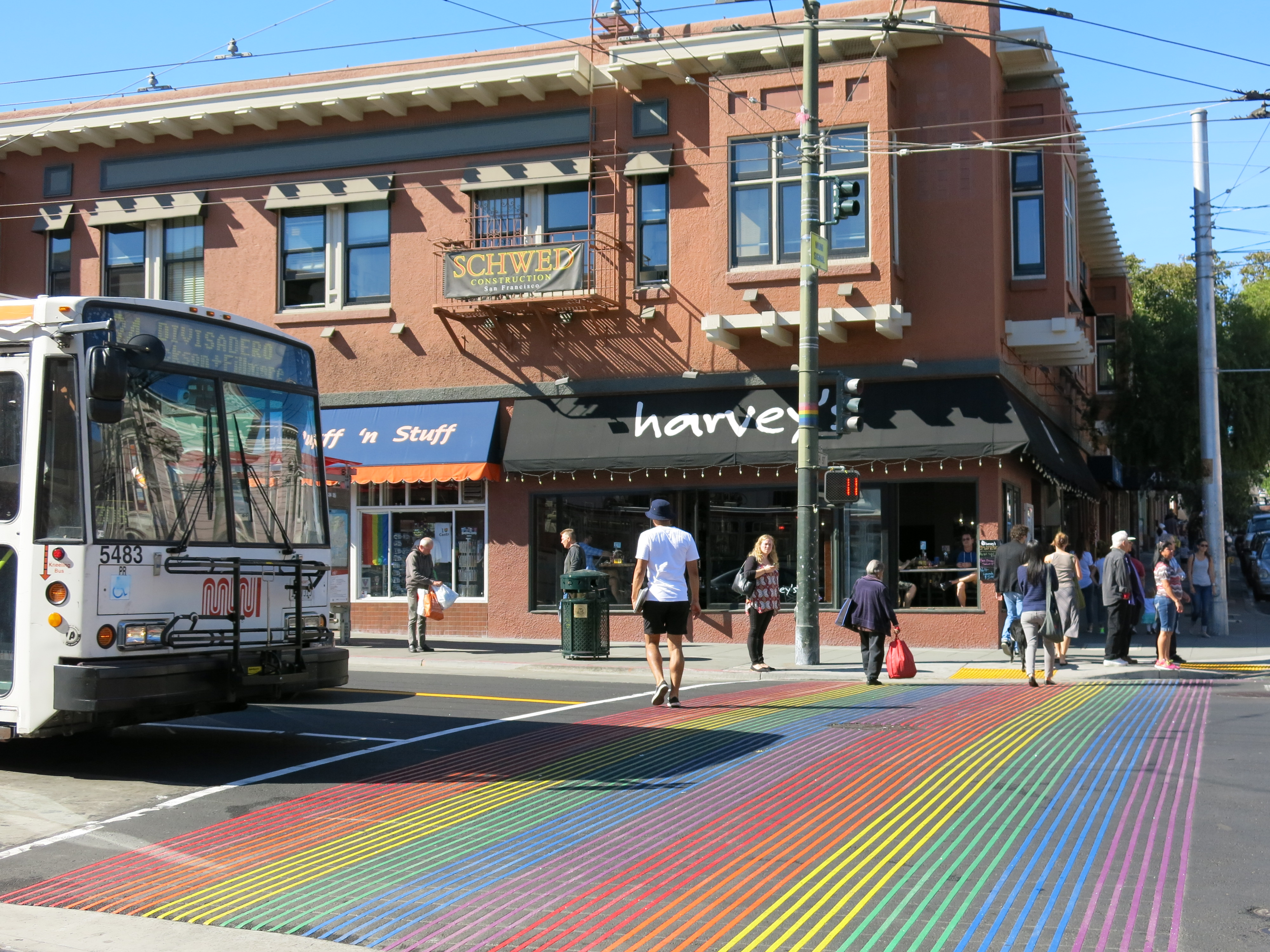 Castro Street Crossing in the Rainbow Flag Colour